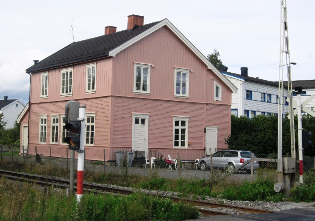 Hjellum stasjon på Rørosbanen